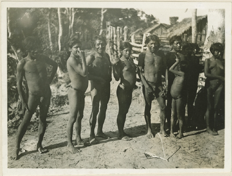 Amerika